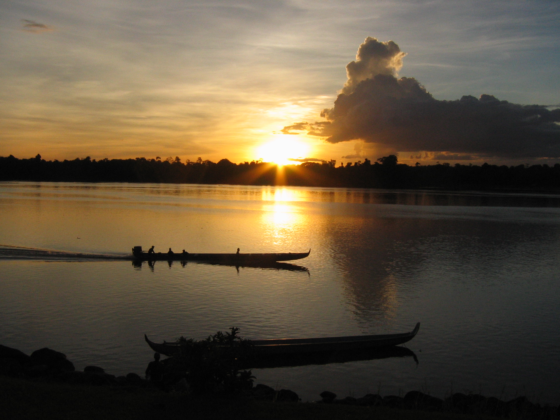 Maroni-Pirogue et coucher de soleil